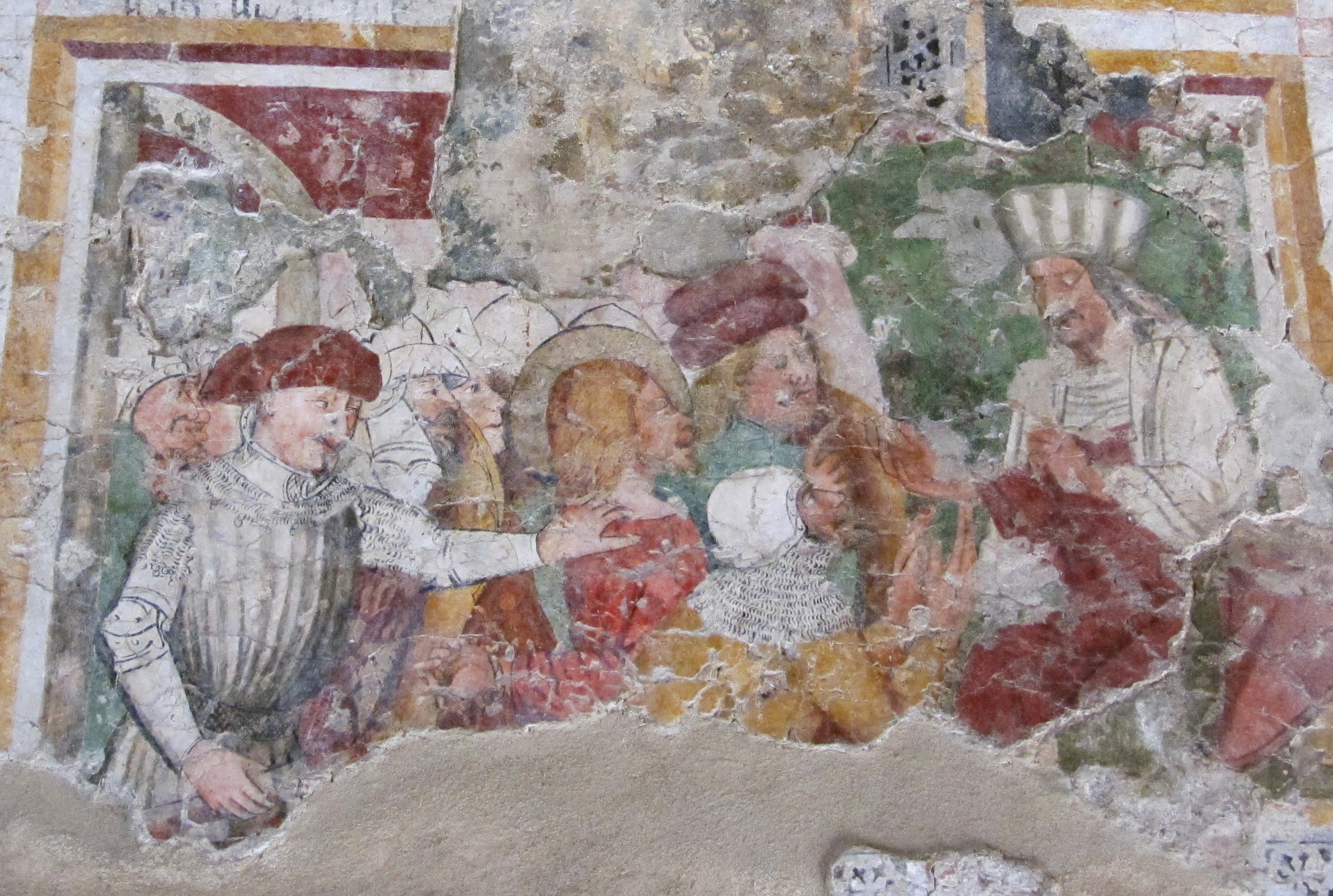 Chiesa di Ognissanti - Ospedaletto (UD) - ITALY - Lacerto di affresco raffigurante Cristo davanti a Caifa